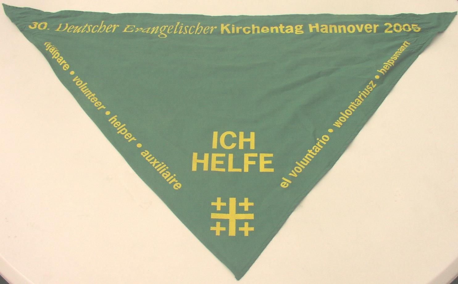 30.Deutsche Evangelischer Kirchentag Hannover 2005 Helferhalstuch